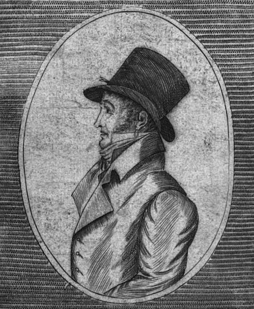 "Mathurin Bruneau, se disant Charles de Navarre. Jugé à Rouen en février 1818".